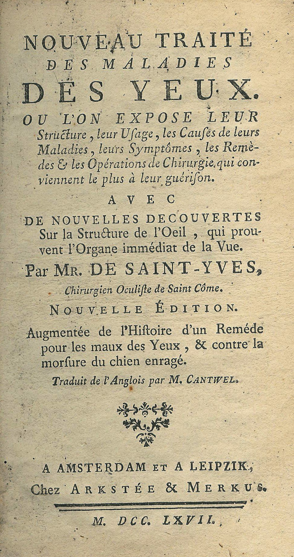 Frontispice de la troisième édition du traité des maladies des yeux de Charles Saint-Yves, ouvrage en la possession de l'auteur